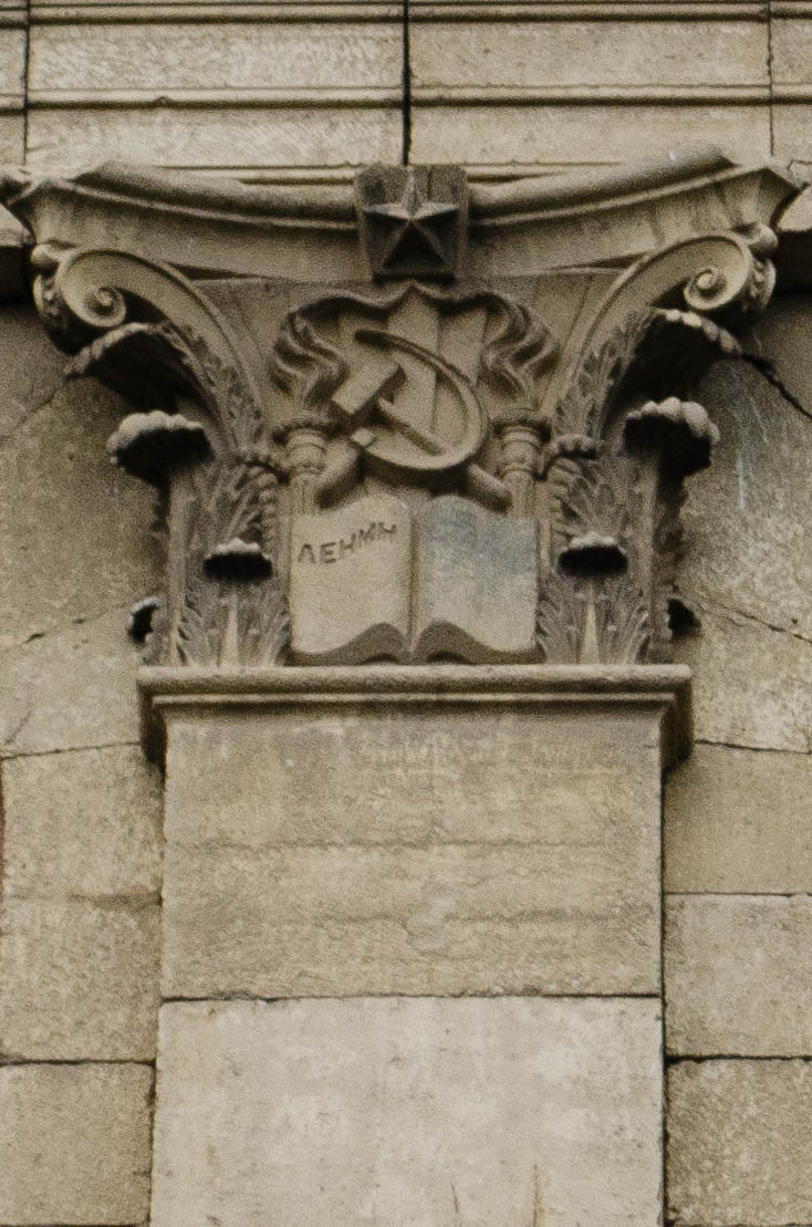 Одна из книг, украшающих здание волгоградского медицинского университета. Фамилия Сталина затёрта в рамках борьбы с культом личности.